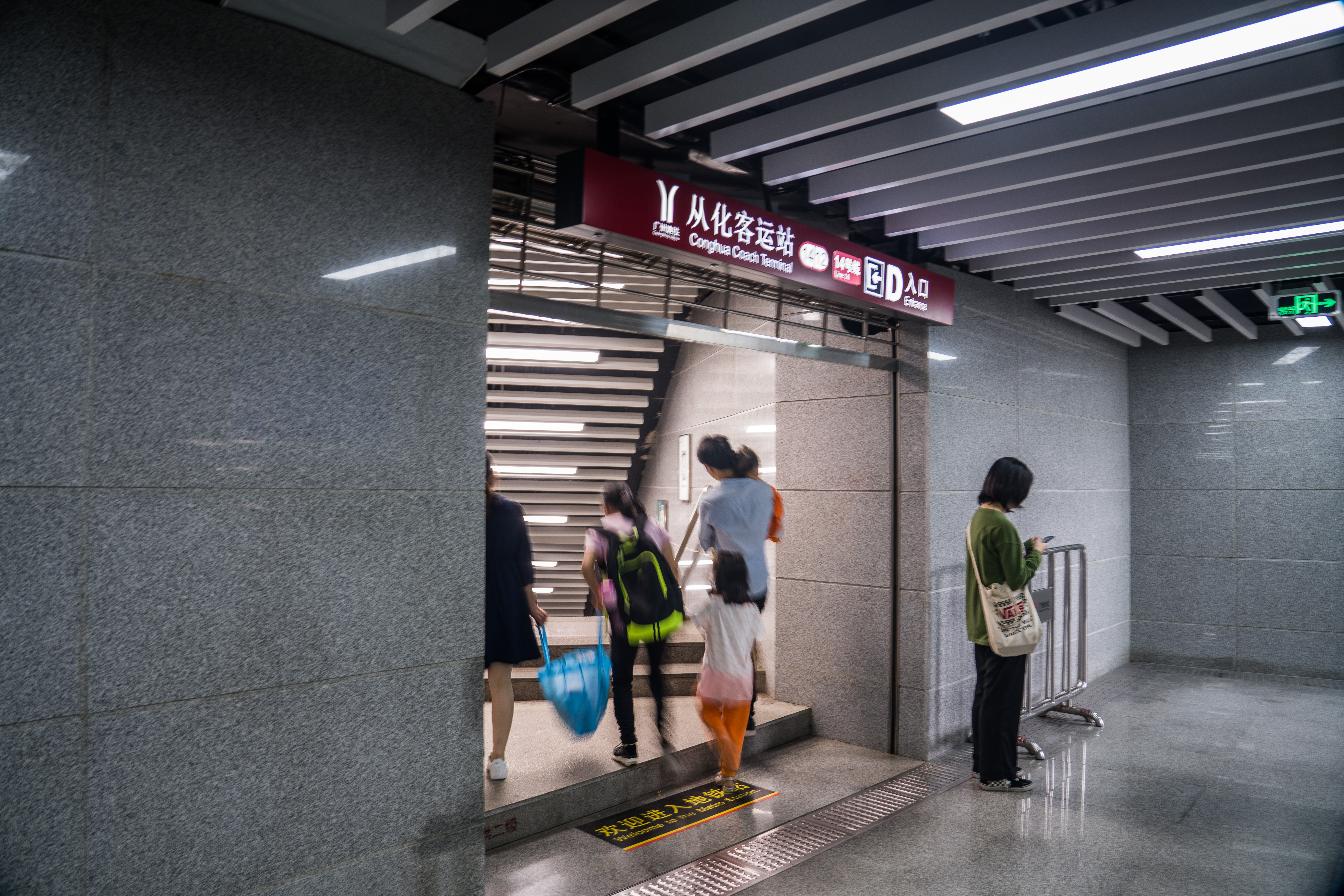 广州地铁从化客运站D出入口